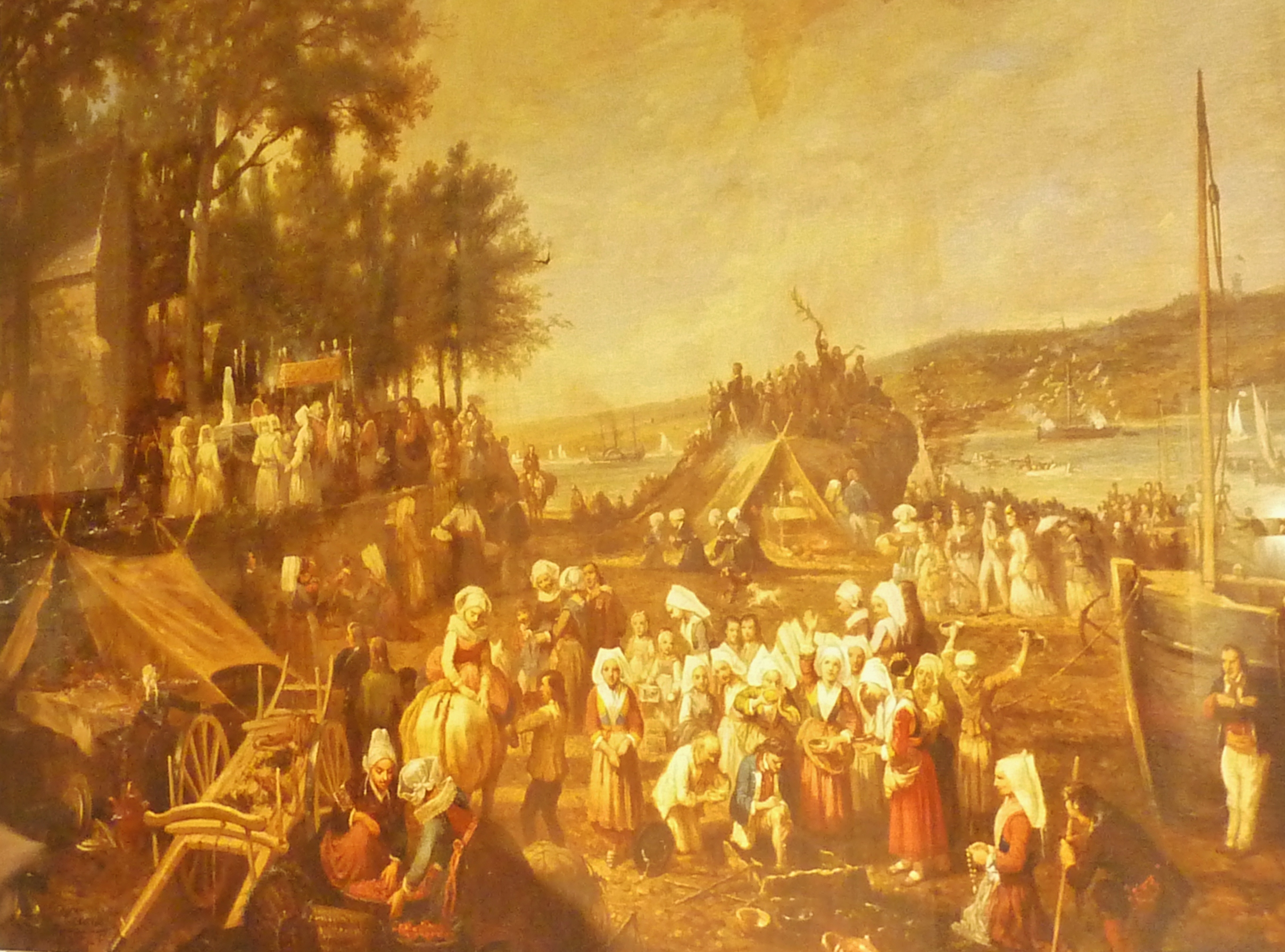 Plougastel : le Pardon de la Saint-Jean dans la seconde moitié du XIXe siècle